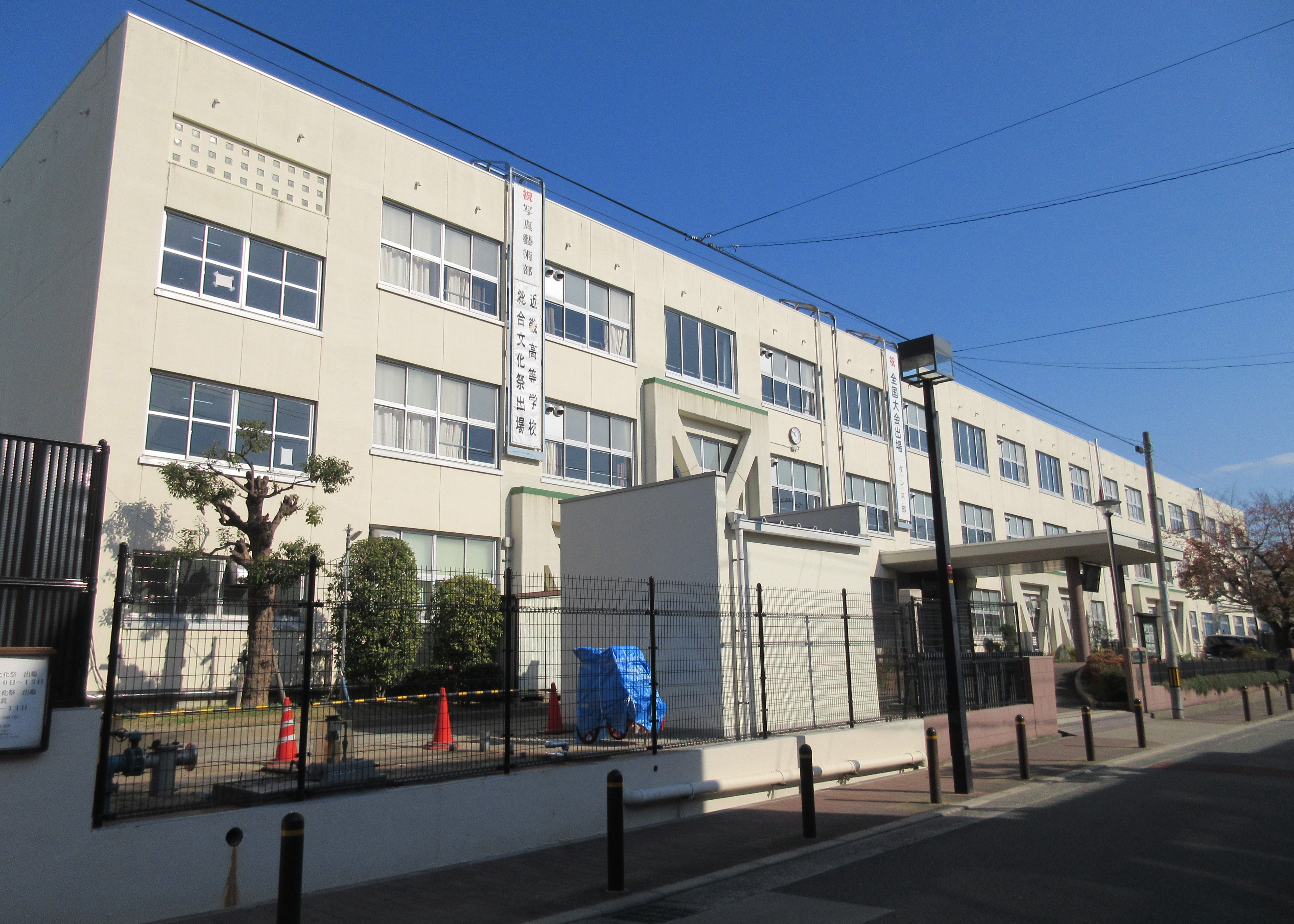 大阪府立成城高等学校